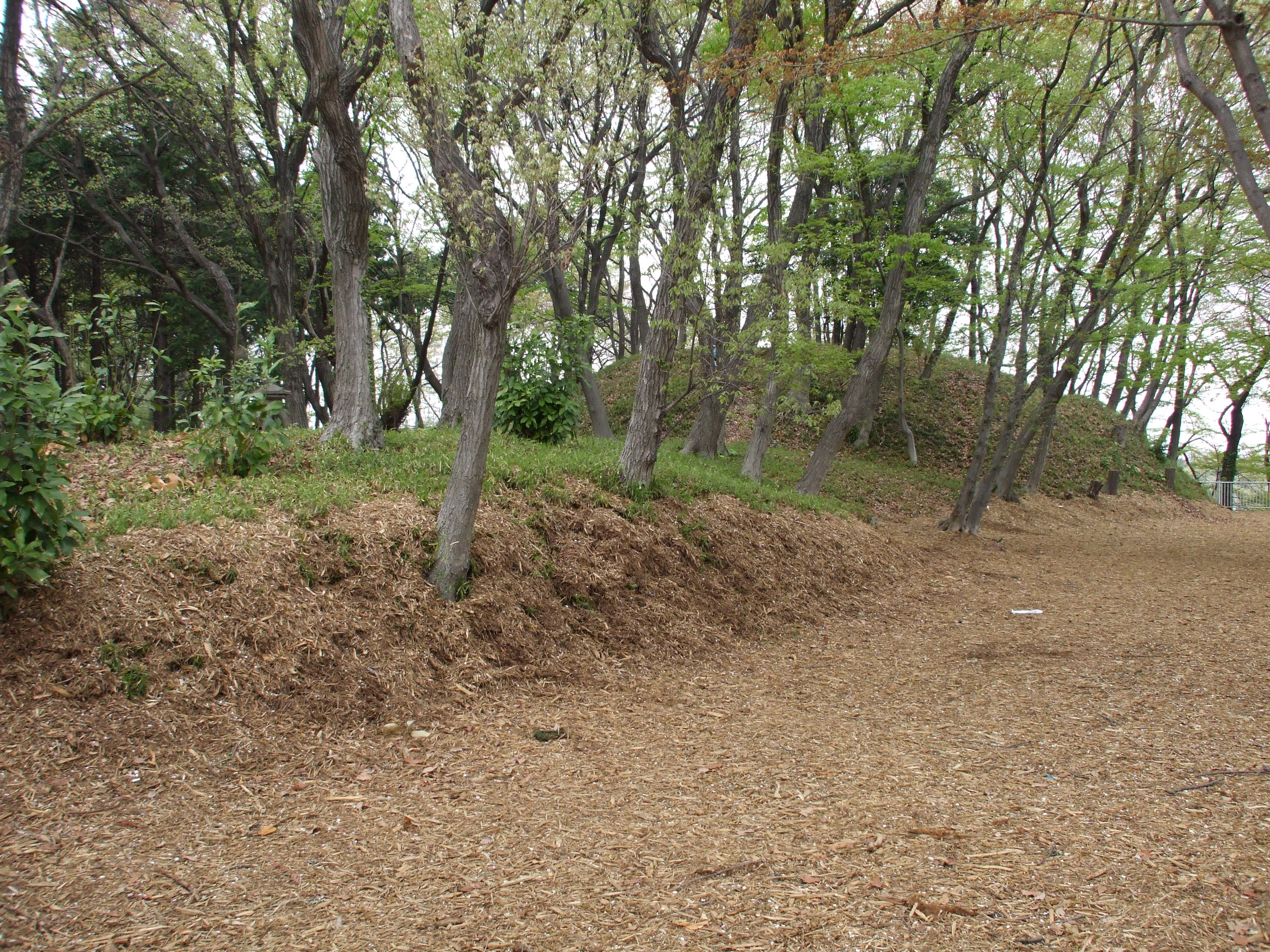 秋葉山古墳群第一号墳 Akibayama Kofun-gun, Ebina, Kanagawa, Japan